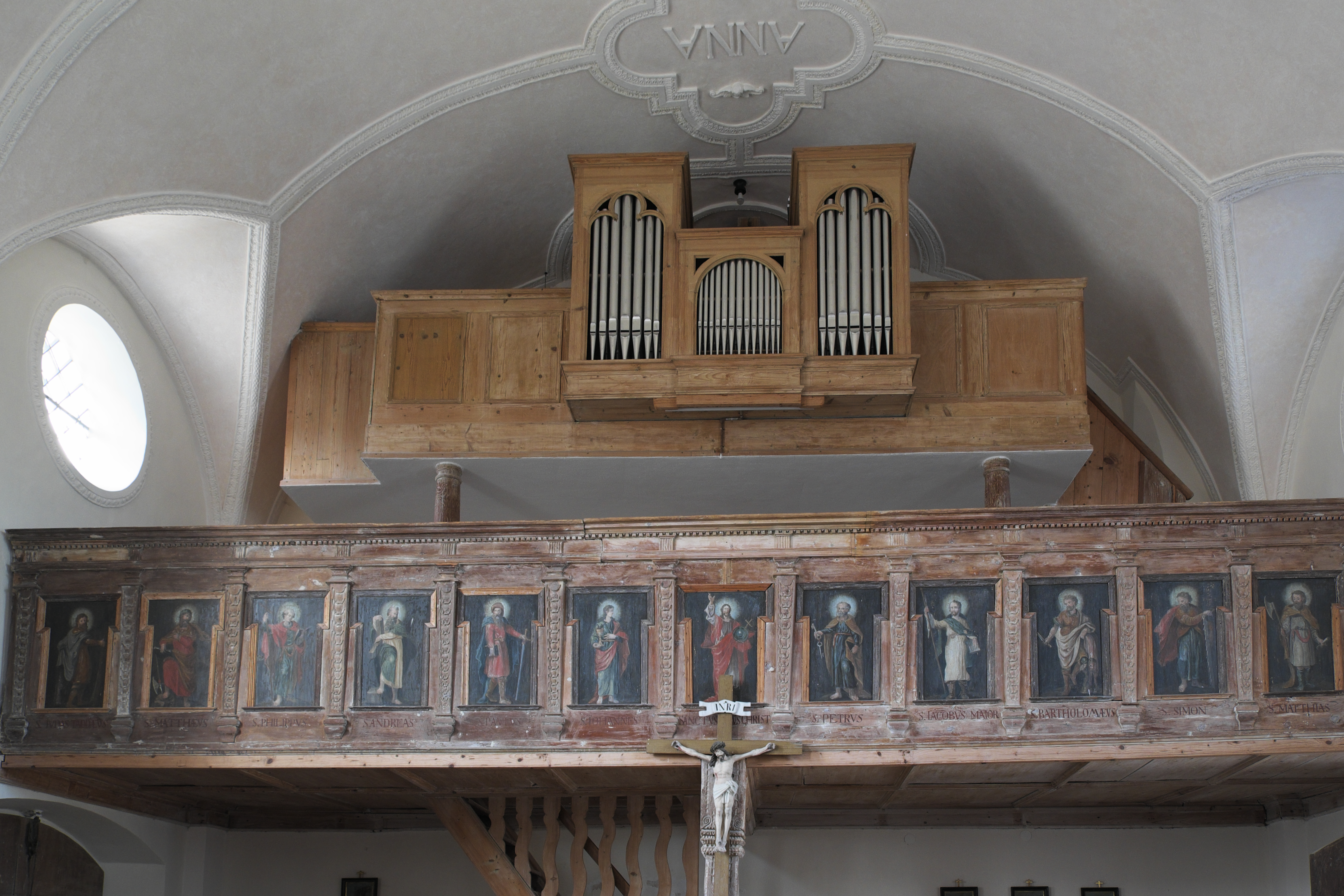 Katholische Filialkirche St. Vitus in Grucking (Fraunberg) im Landkreis Erding (Bayern/Deutschland), Empore